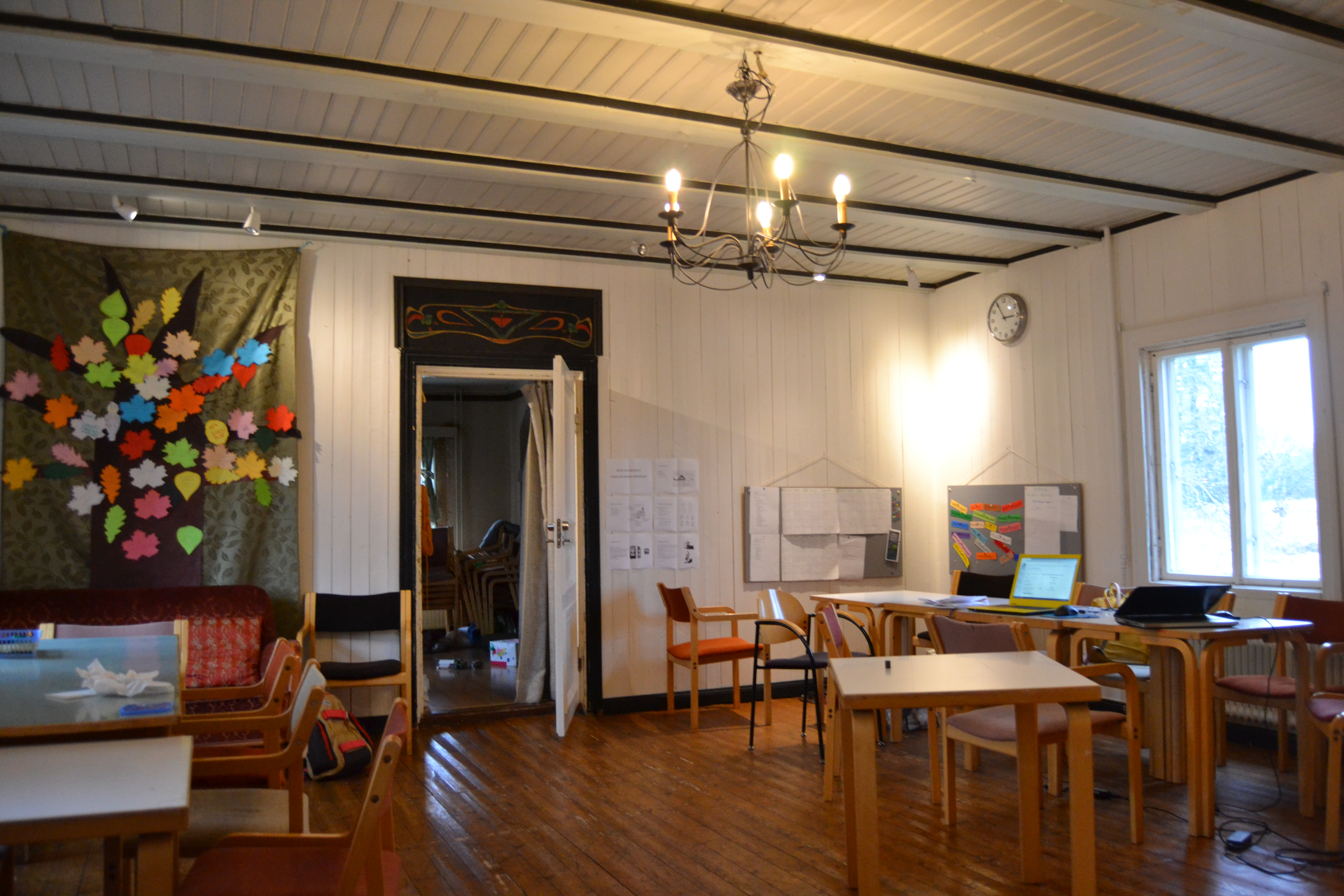 Turun Feeniks-koulun sisätila talvella 2020